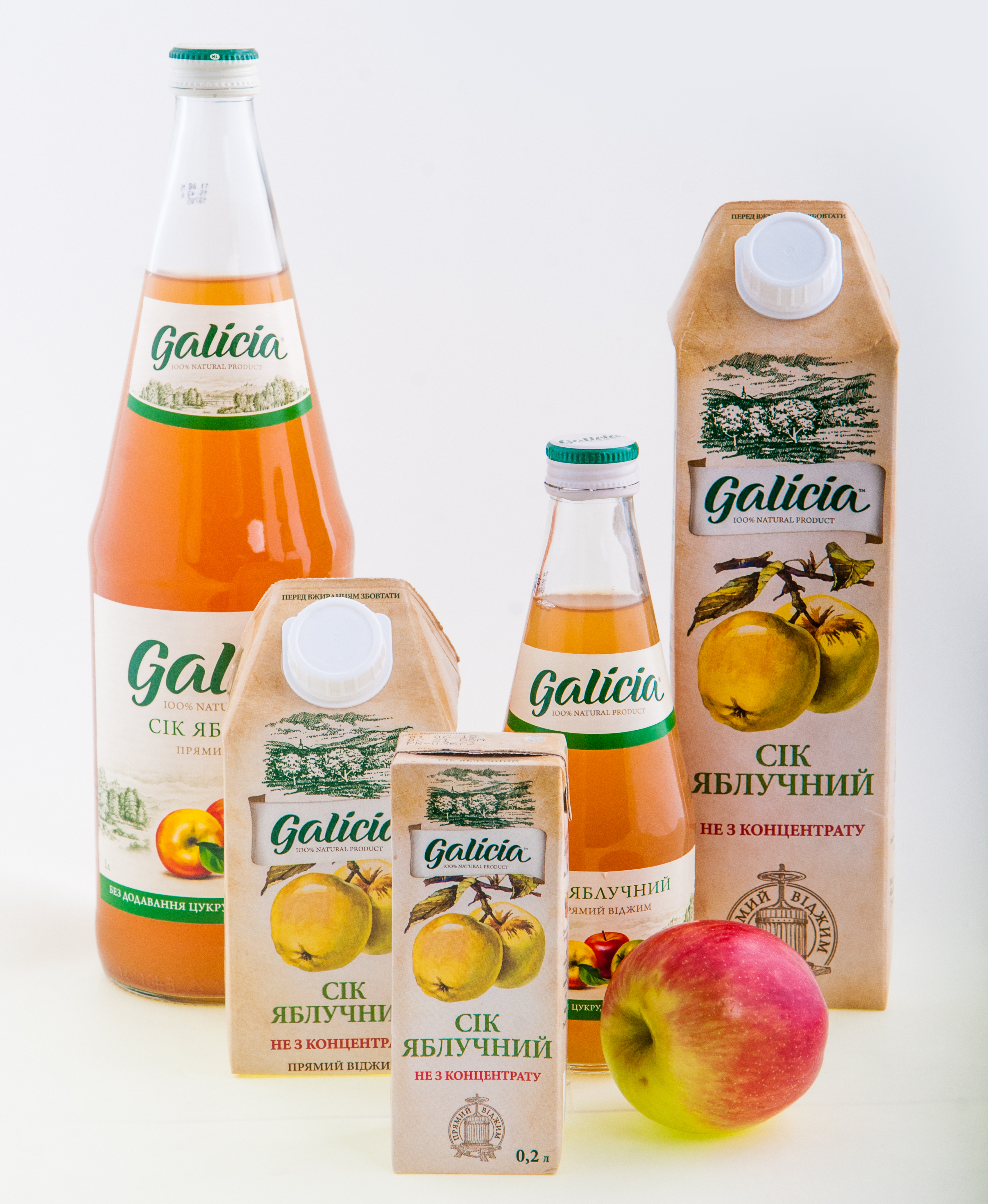 Соки прямого віджиму Galicia